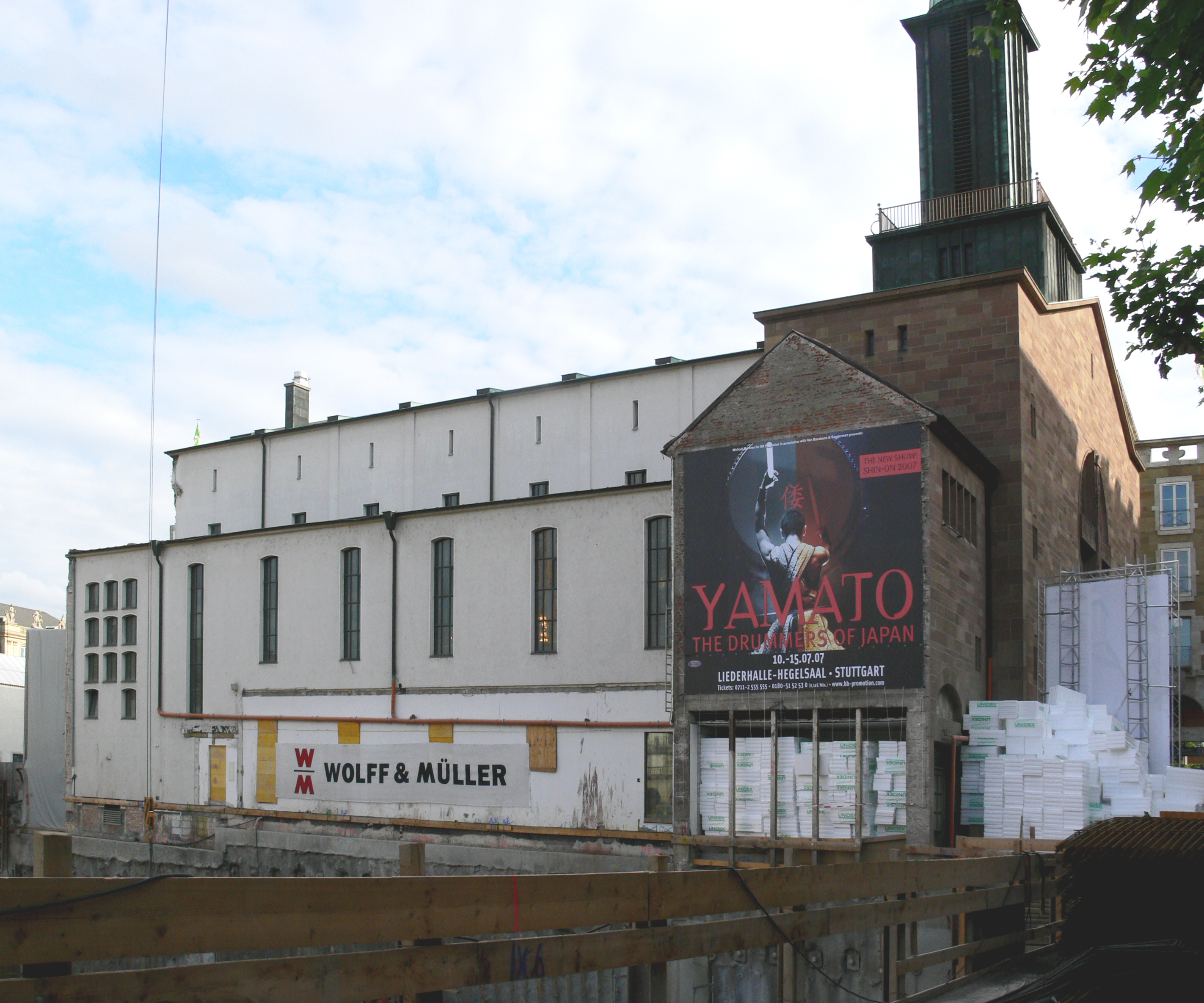 Stuttgart, Kath. Domkirche St. Eberhard, Königstraße (die Seitenansicht wurde durch die Bauarbeiten am Nachbarhaus möglich – durch den Bauzaun fotografiert)